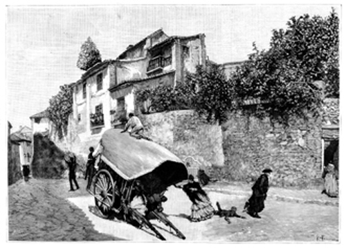 Copia de "¡Que viene el toro!" de Plácido Francés Pascual.